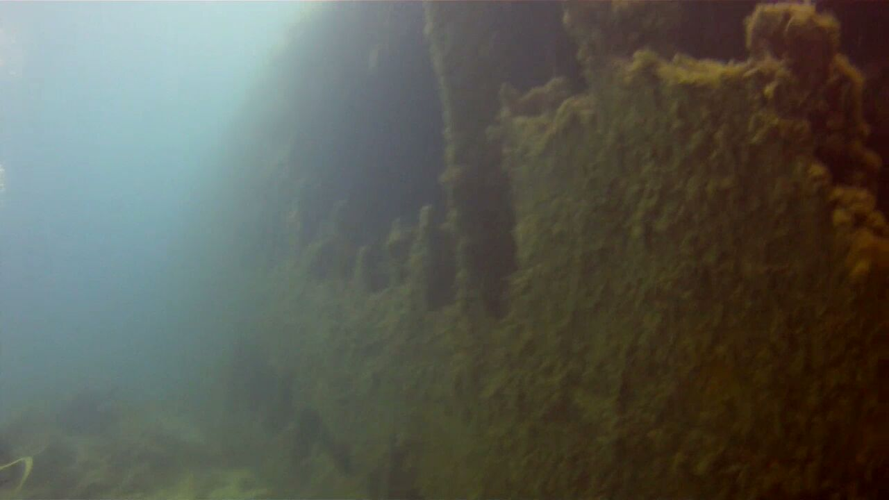 HMS Maori